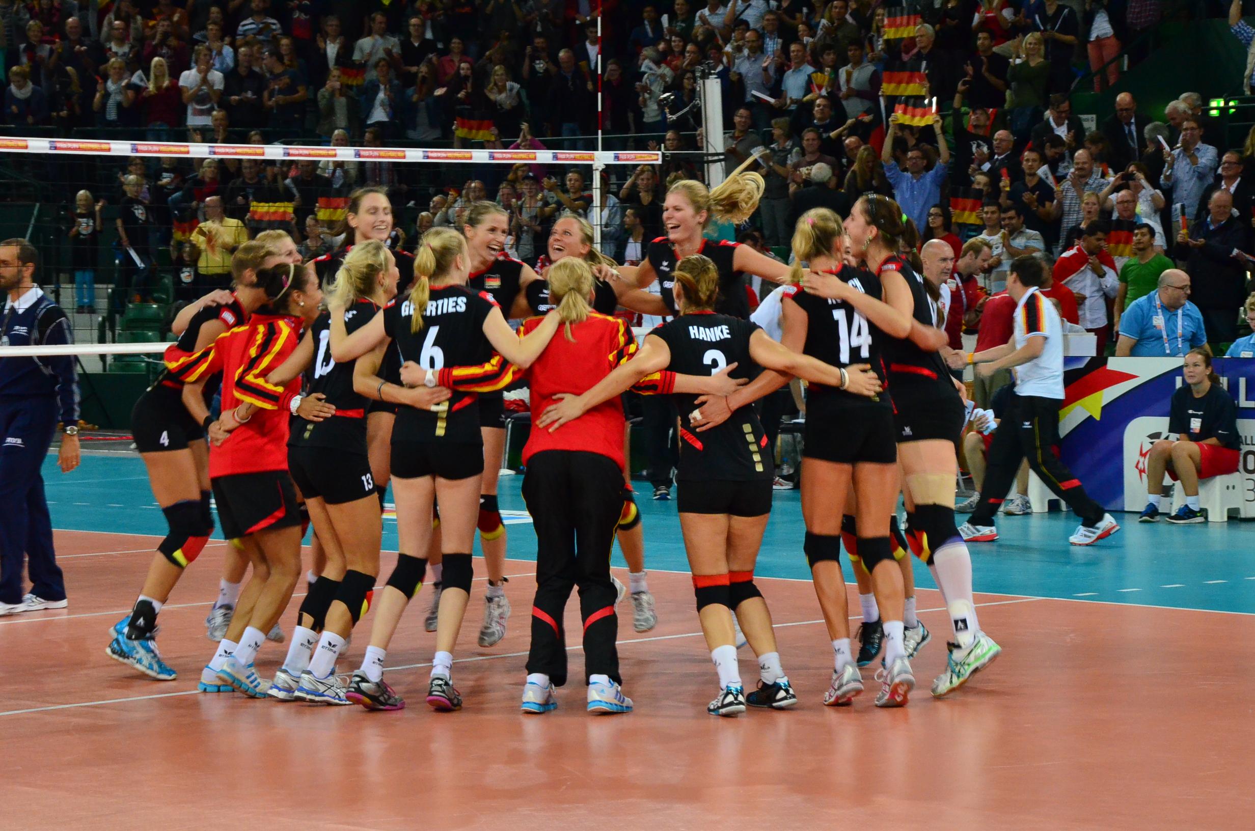 Volleyball-Europameisterschaft der Frauen 2013-Spielort Halle (Westf) Gerry-Weber-Stadion - Spiel 8. September 2013 (Deutschland-Türkei)